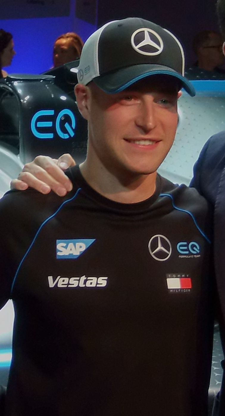 Ian James, Nyck de Vries, Stoffel Vandoorne und Toto Wolff bei der Teampräsentation des Mercedes-Benz EQ Formula E Teams auf der IAA 2019, im Hintergrund der Mercedes-Benz EQ Silver Arrow 01